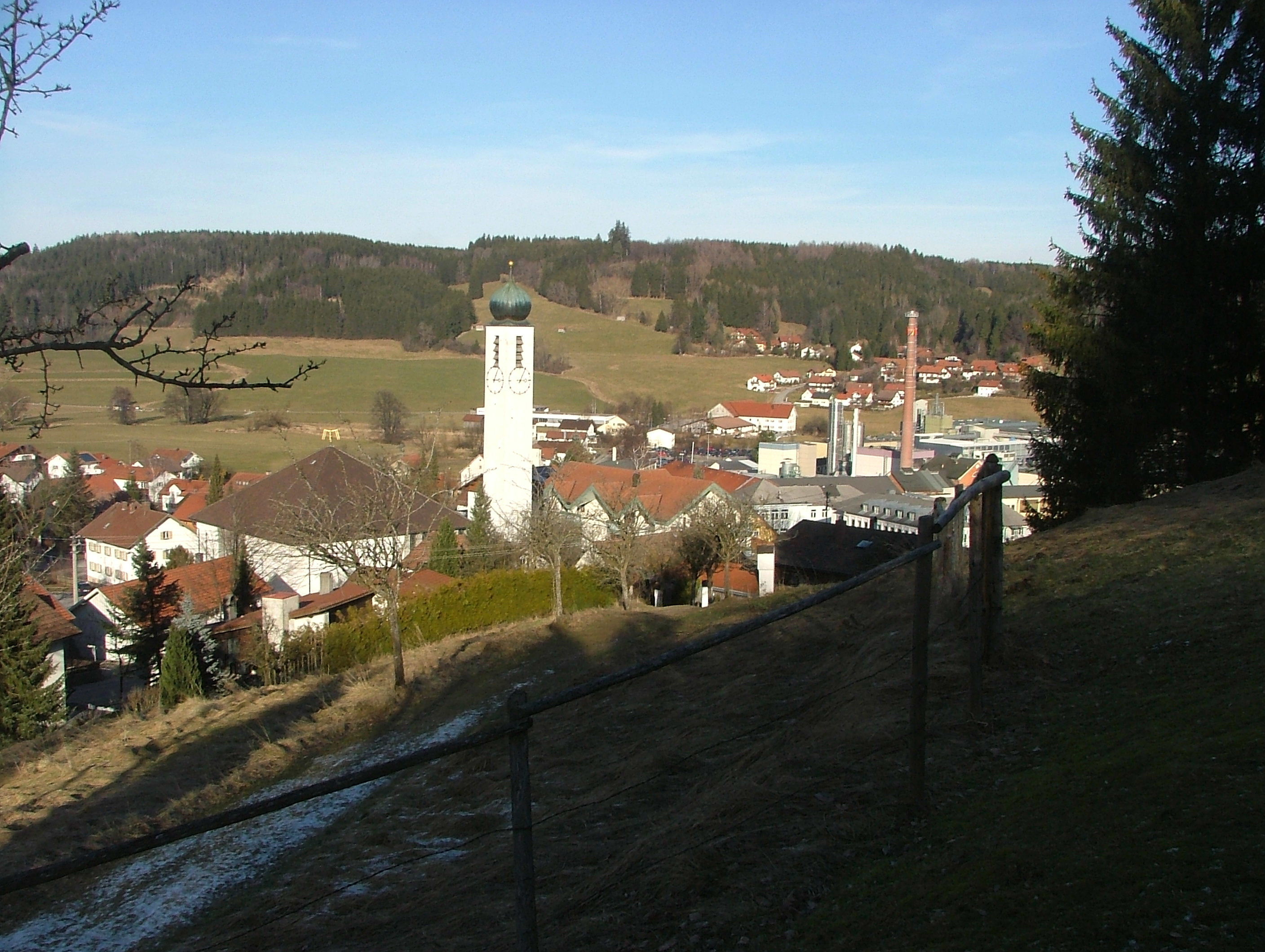 Ronsberg